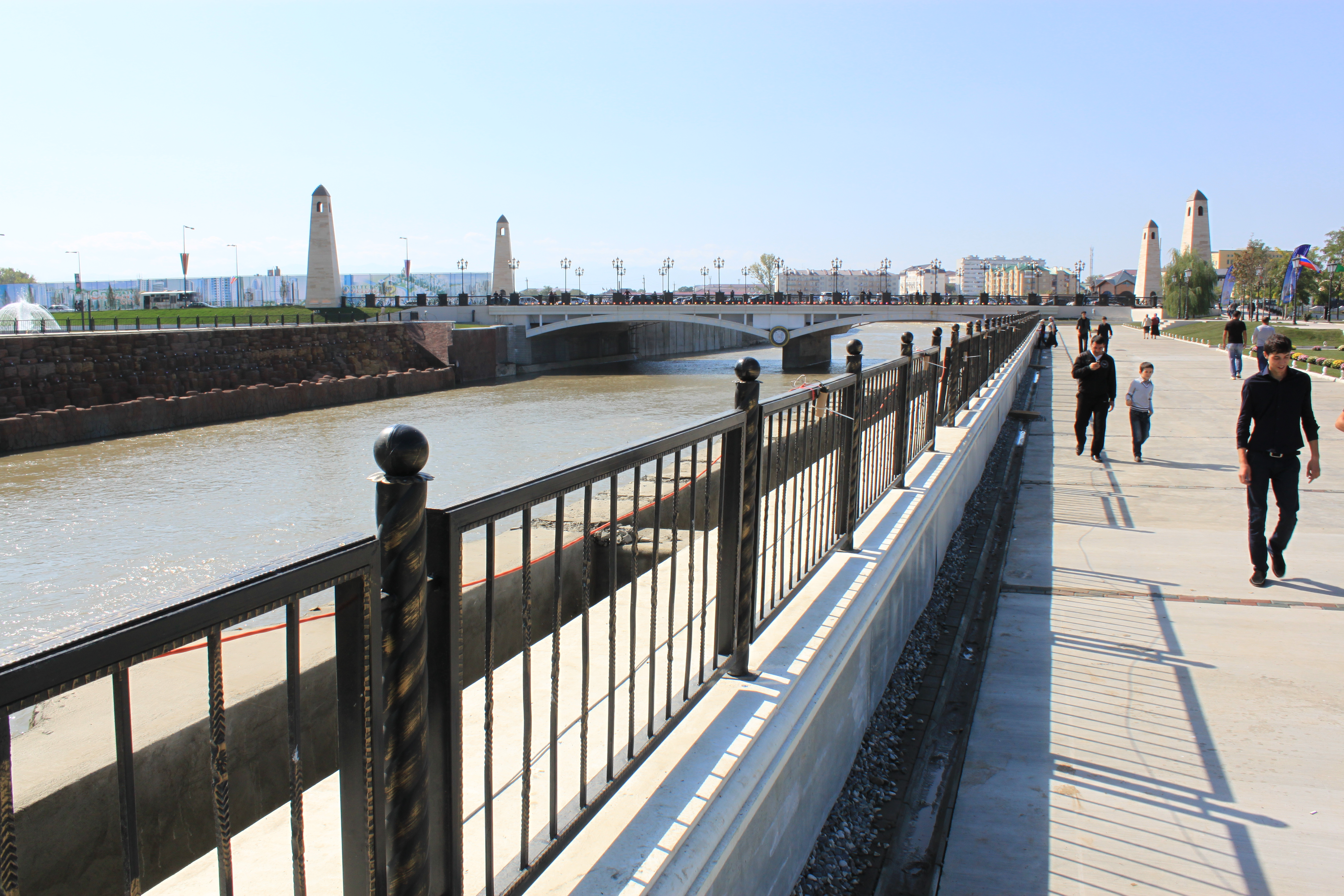 Грозный река Сунжа